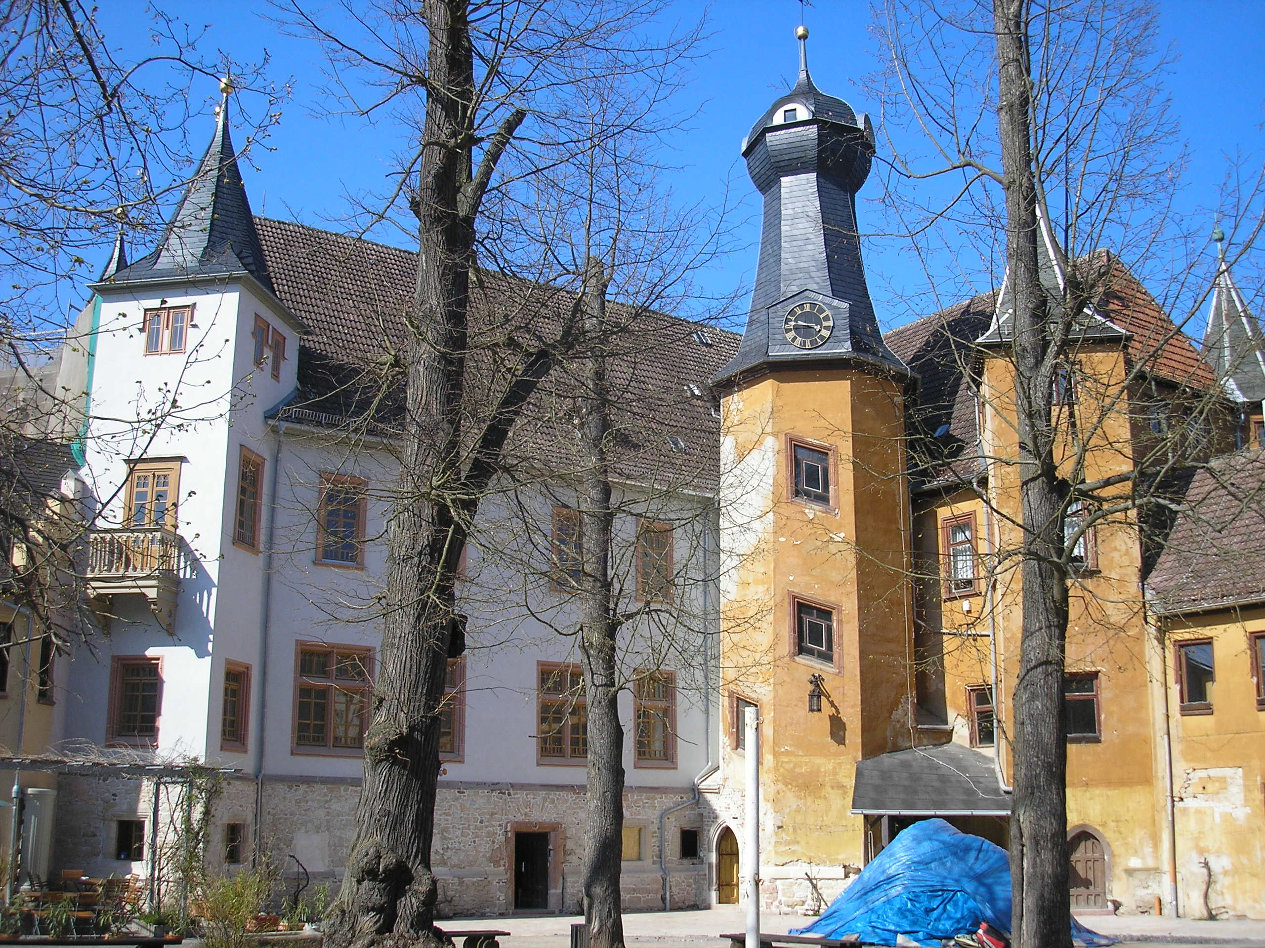 Das Schloss Fröhliche Wiederkunft in Wolfersdorf (Thüringen).